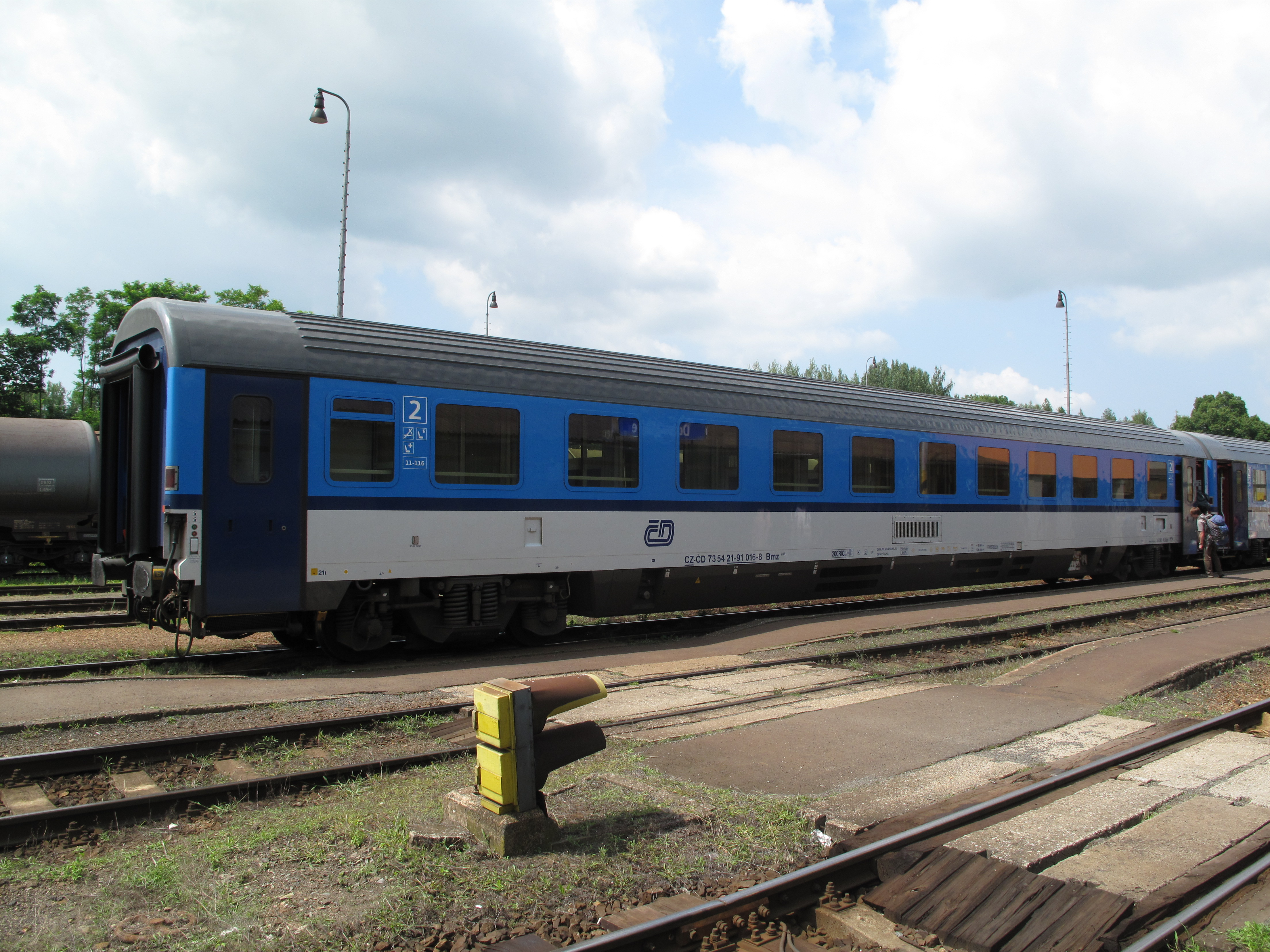 Osobní vůz ČD řady Bmz v Domažlicích